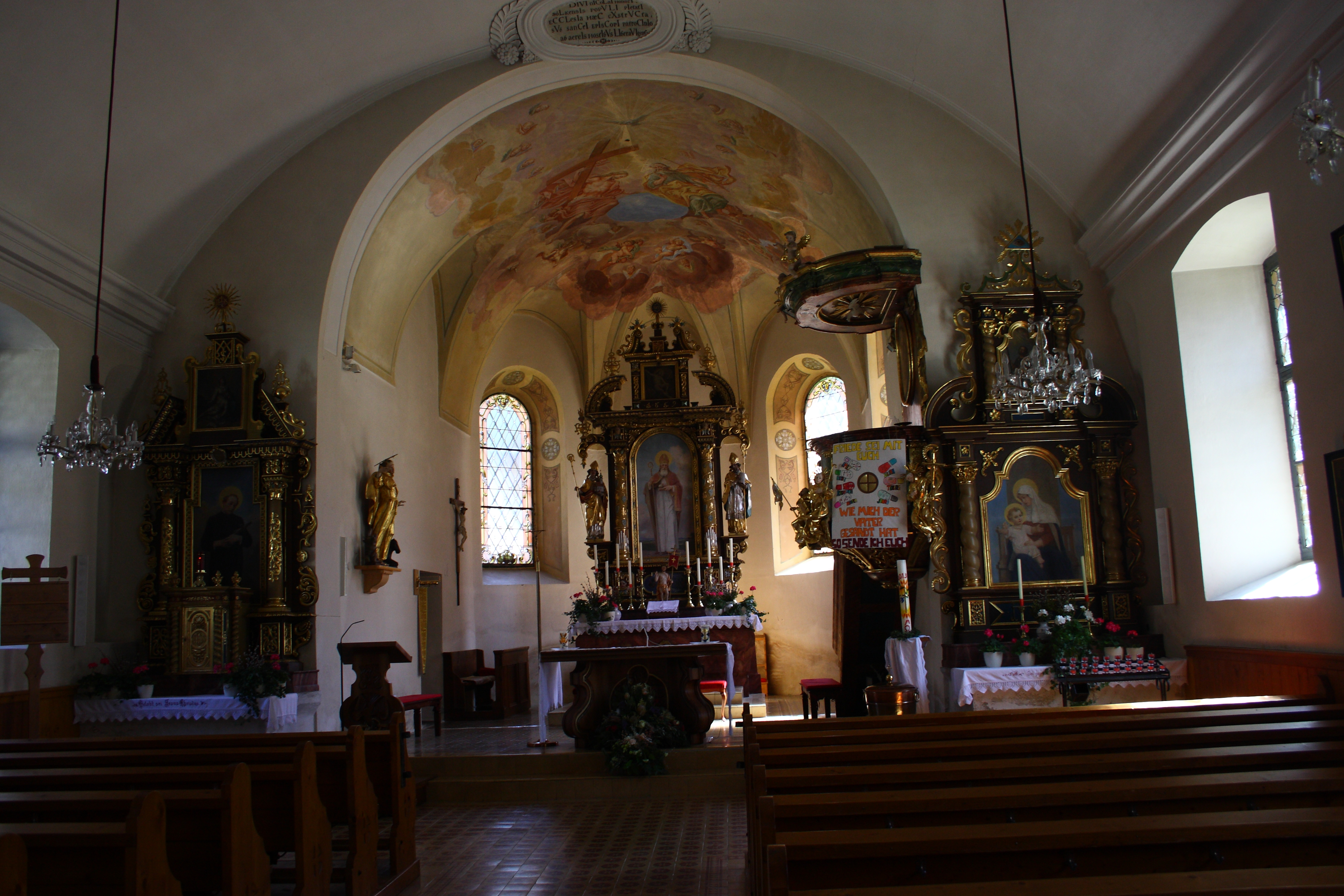 Kirche mit Friedhof in St. Nikolai im Sölktal